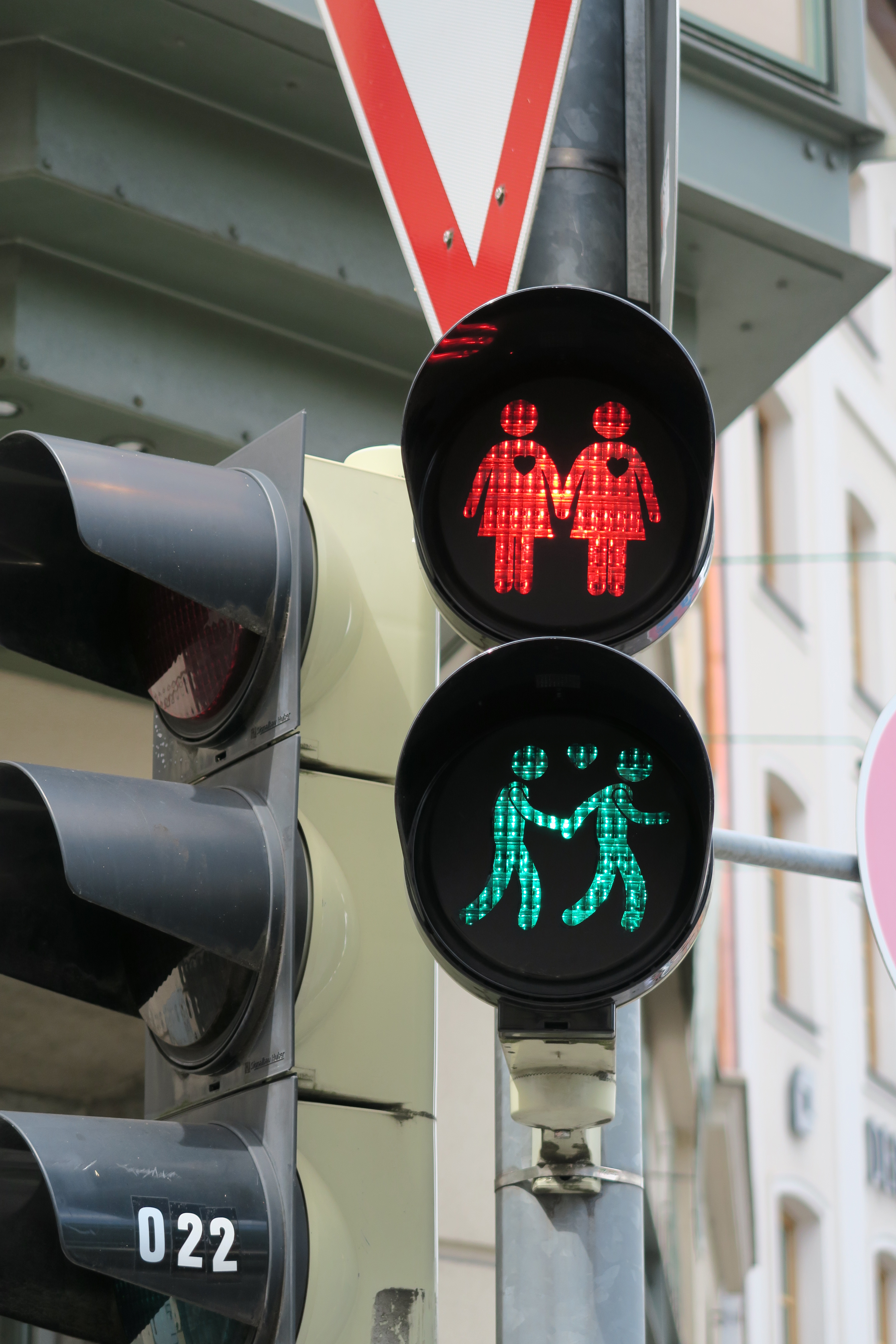 Ampelmännchen in der Reichenbachstraße in München